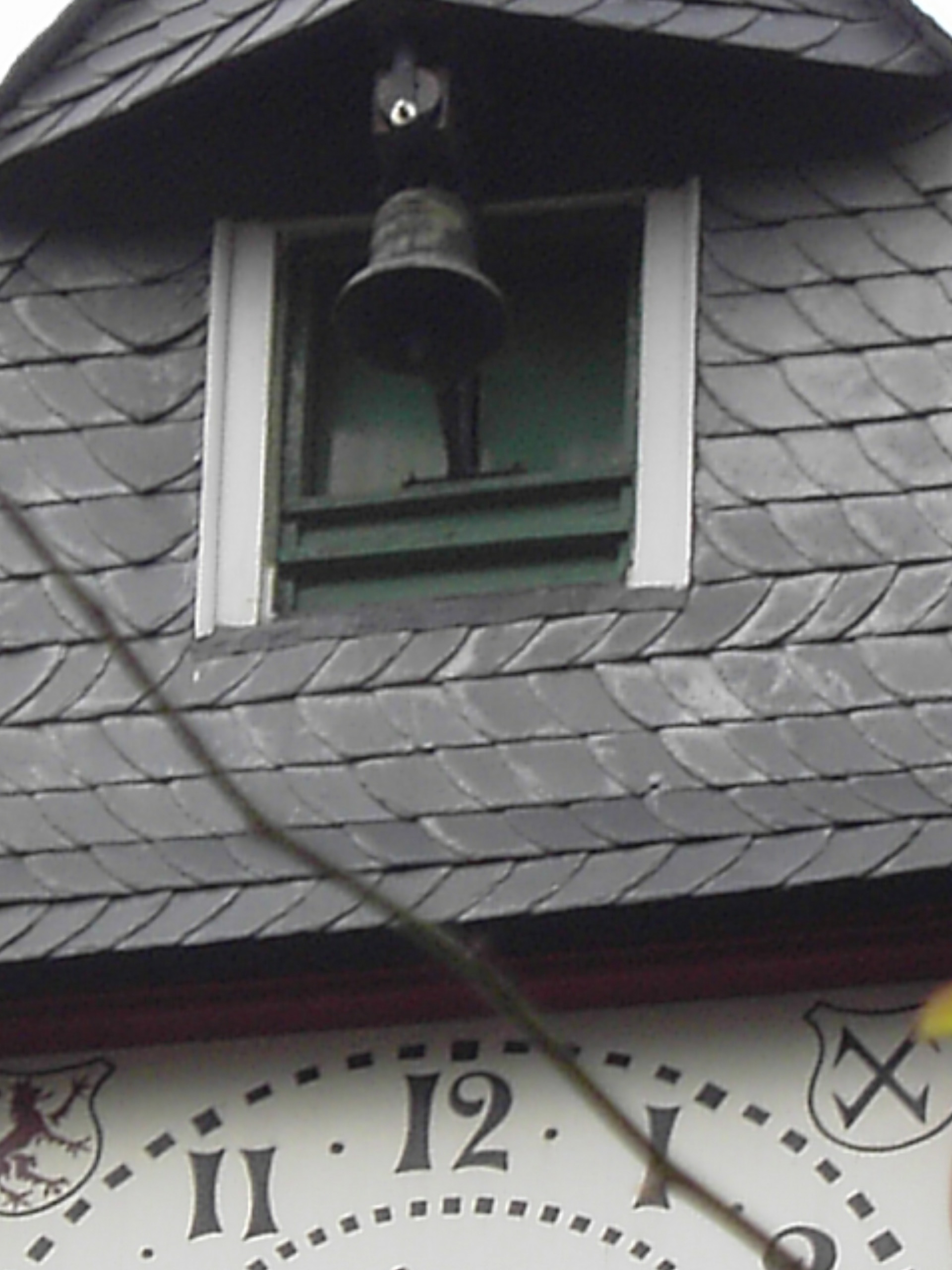 Glocke der ehemaligen Kapelle an der Oberburg